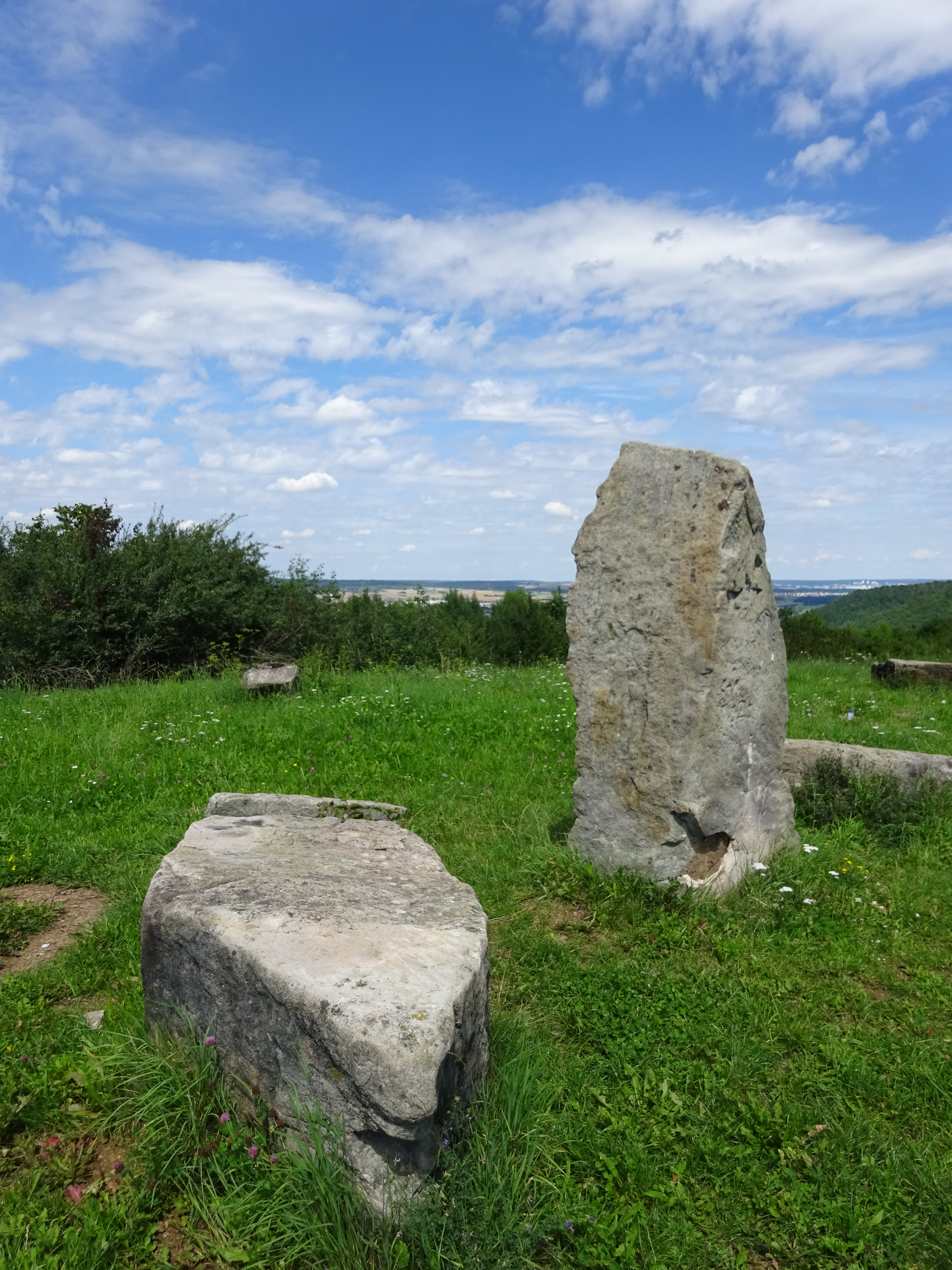 Auf dem Stellberg